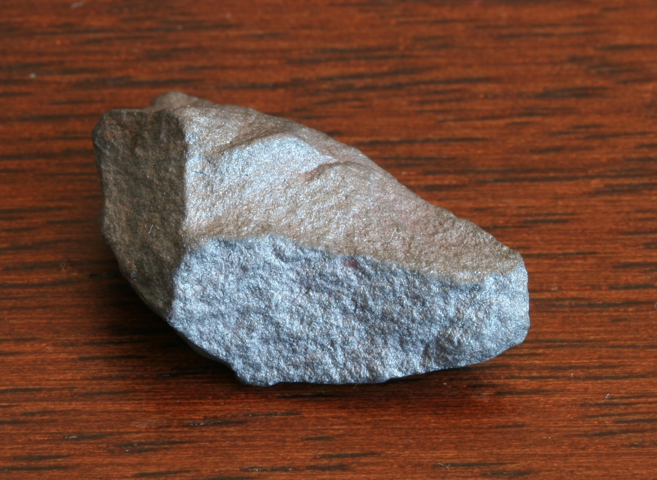 Hematiet